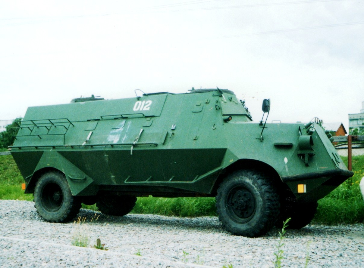 Беларуская (тарашкевіца): Латвійскі панцырны транспартар швэцкай вытворчасьці m42. Здымак зроблены на падворку рыскага аўтамузею, пасьля спісаньня з узброеньня выведна-дэсантнага баталёну (IDB) латвійскага войска.